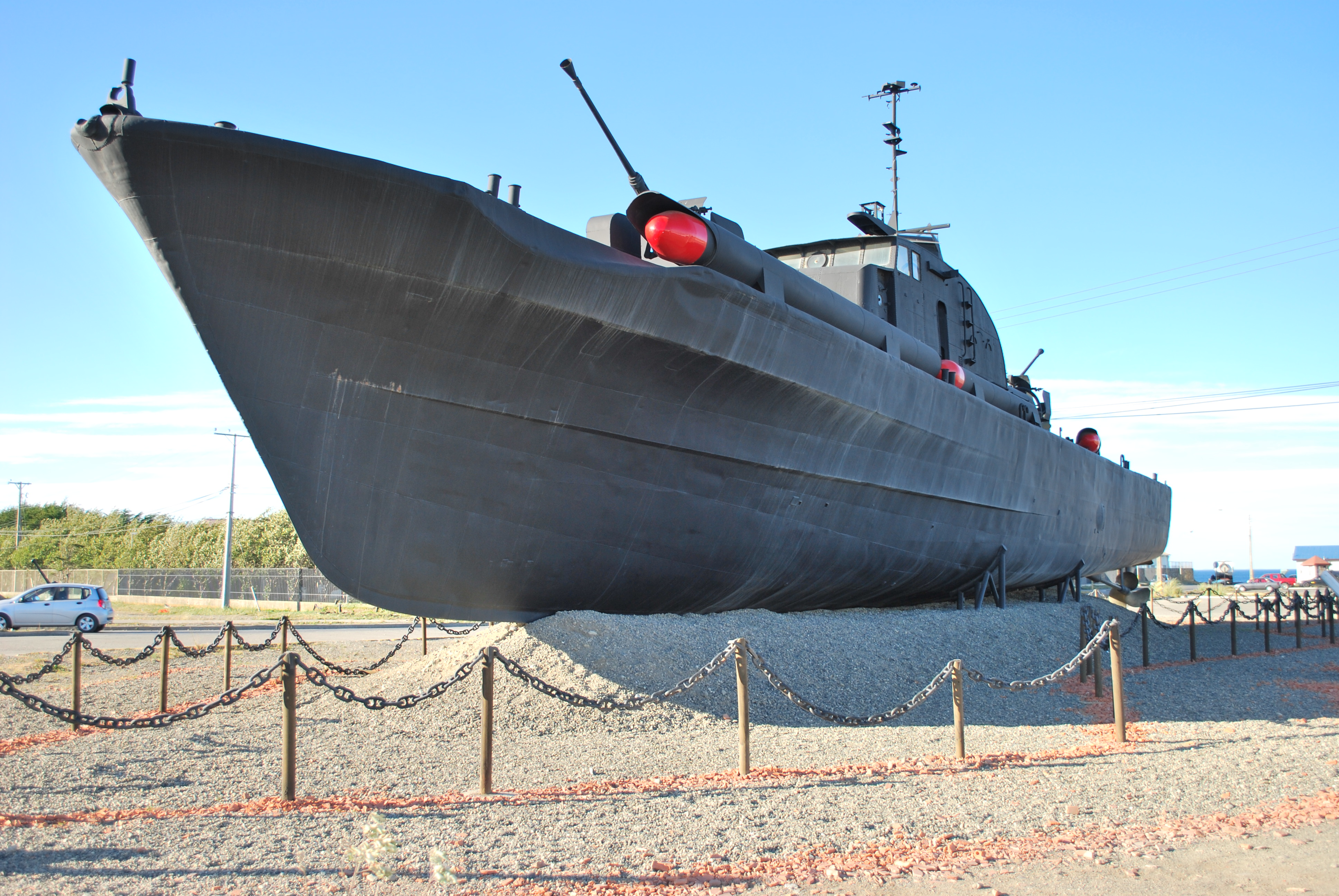 Fresia PTF 81 en Punta Arenas